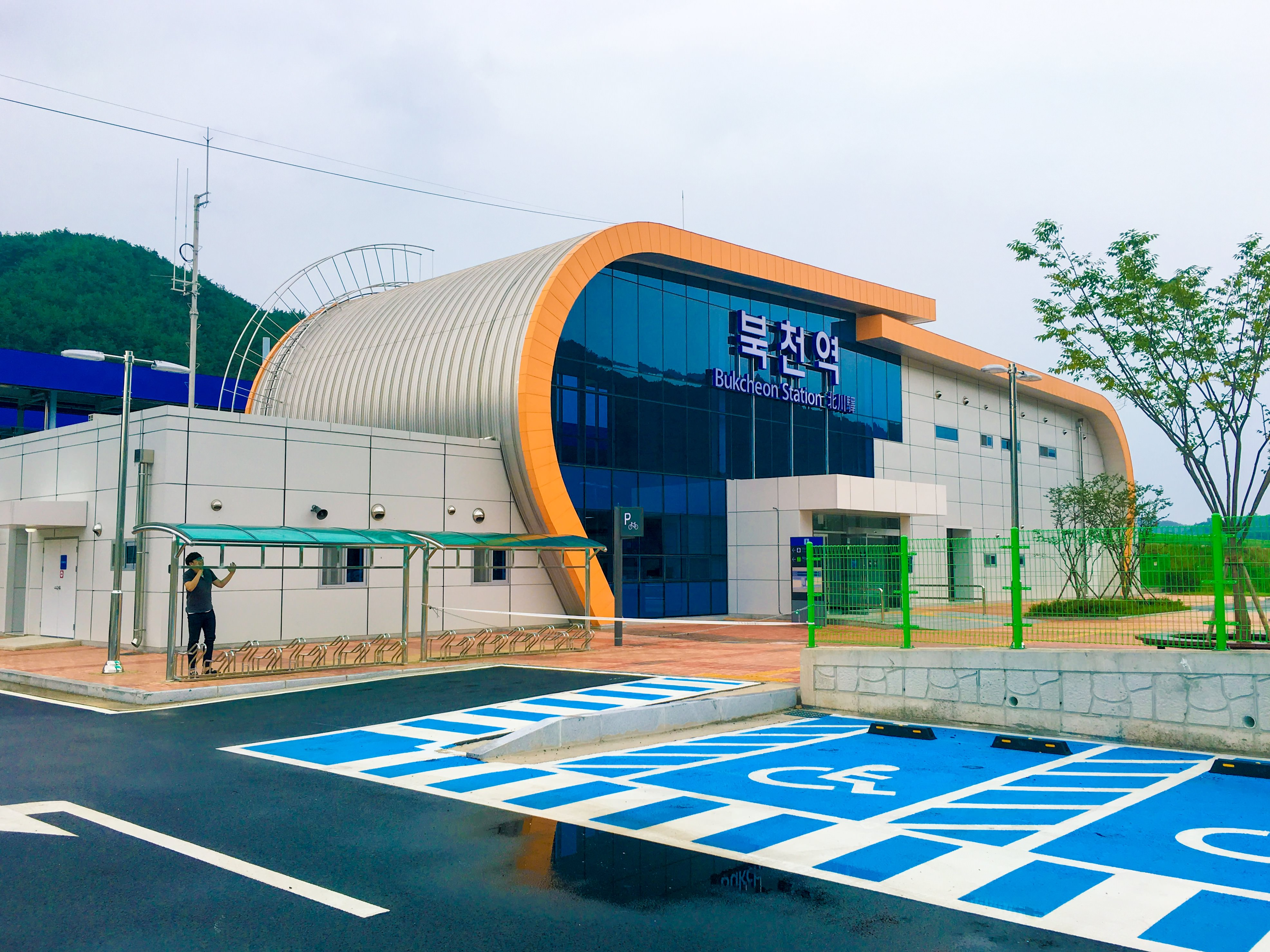 북천역 역사